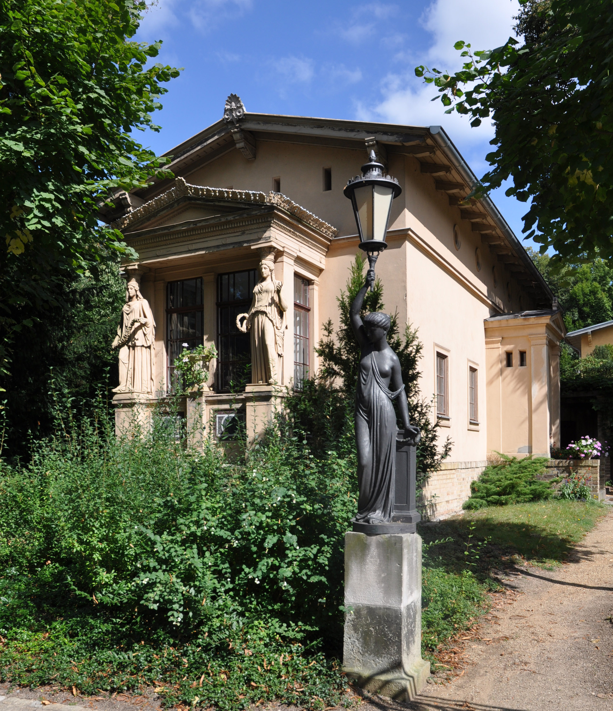 Pförtnerhaus am Johannitertor Klein-Glienicke